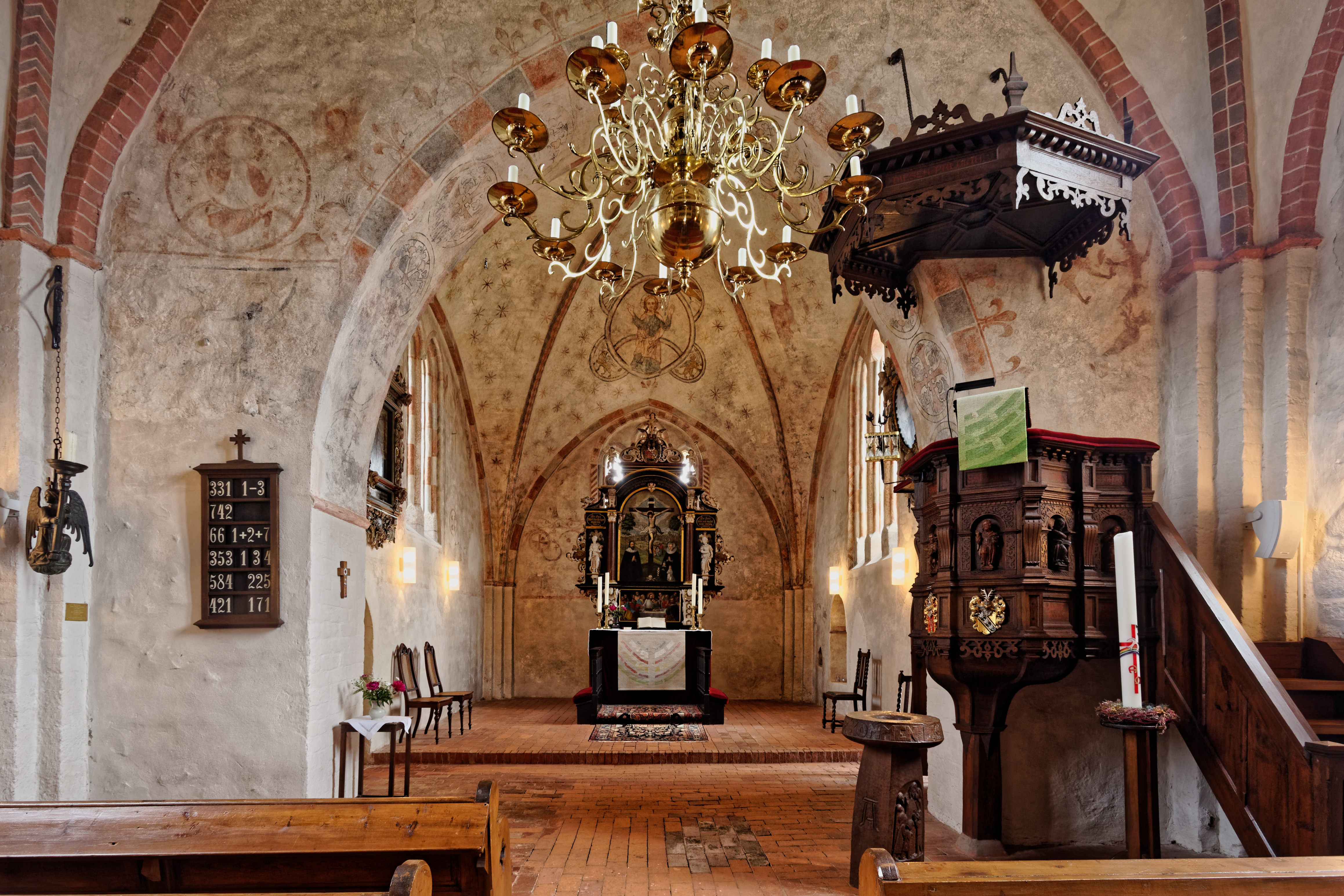 Kirche in Behlendorf, Innenraum, Blick zum Altar